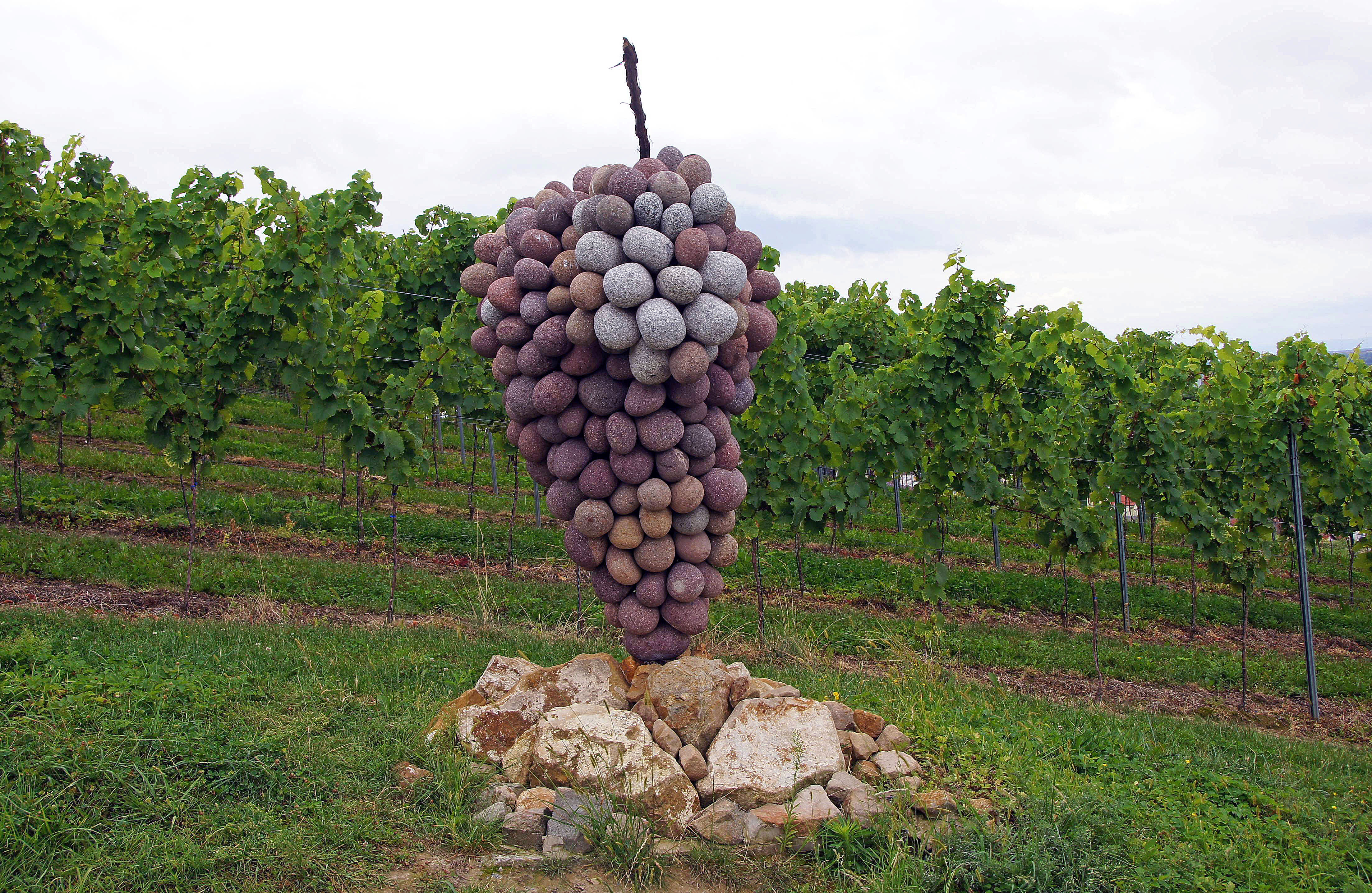 Stein- und Wein-Lehrwanderweg in den Weinbergen zwischen Heppenheim und Bensheim, Kreis Bergstraße, Hessen